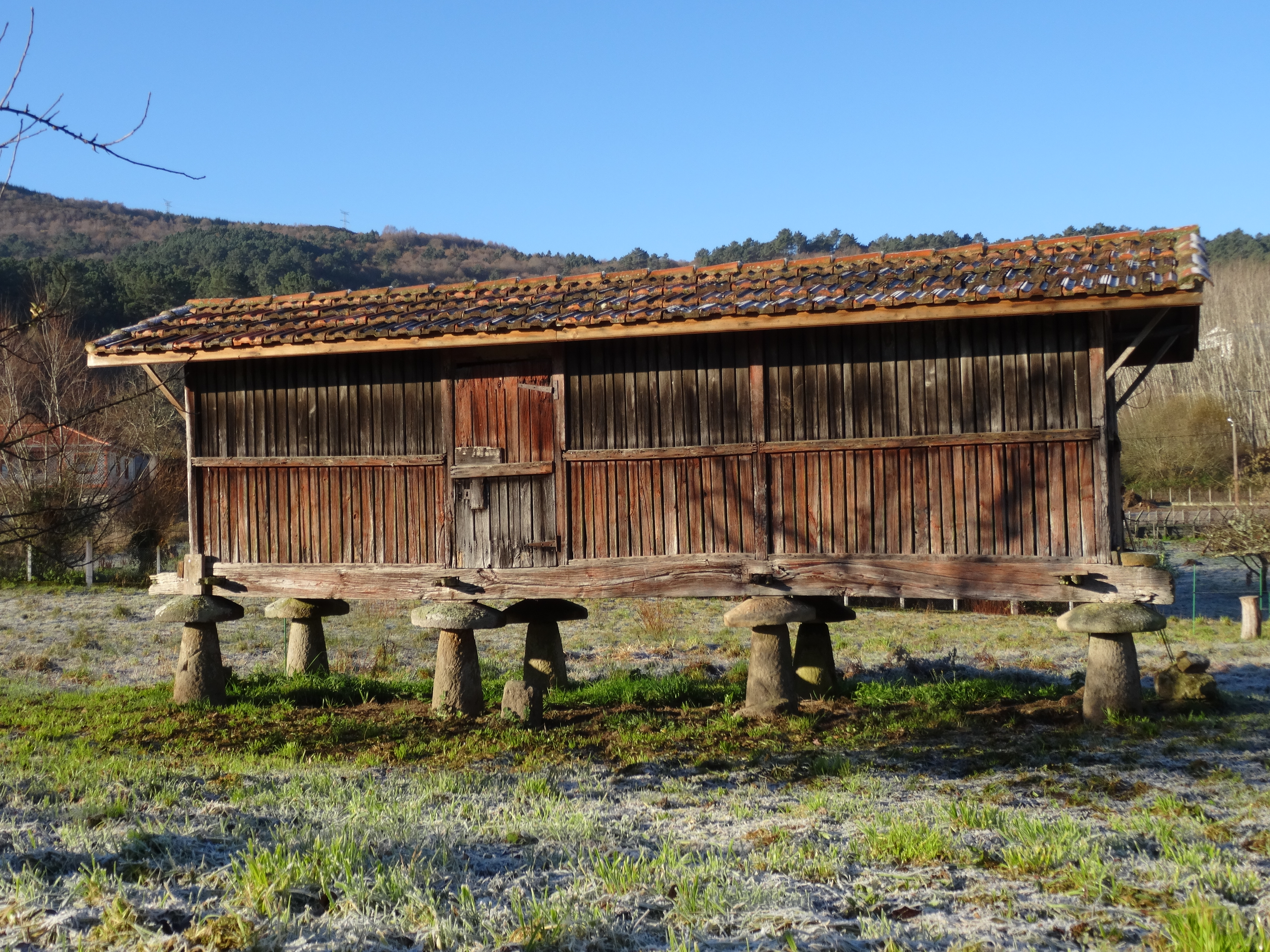 Ver título.